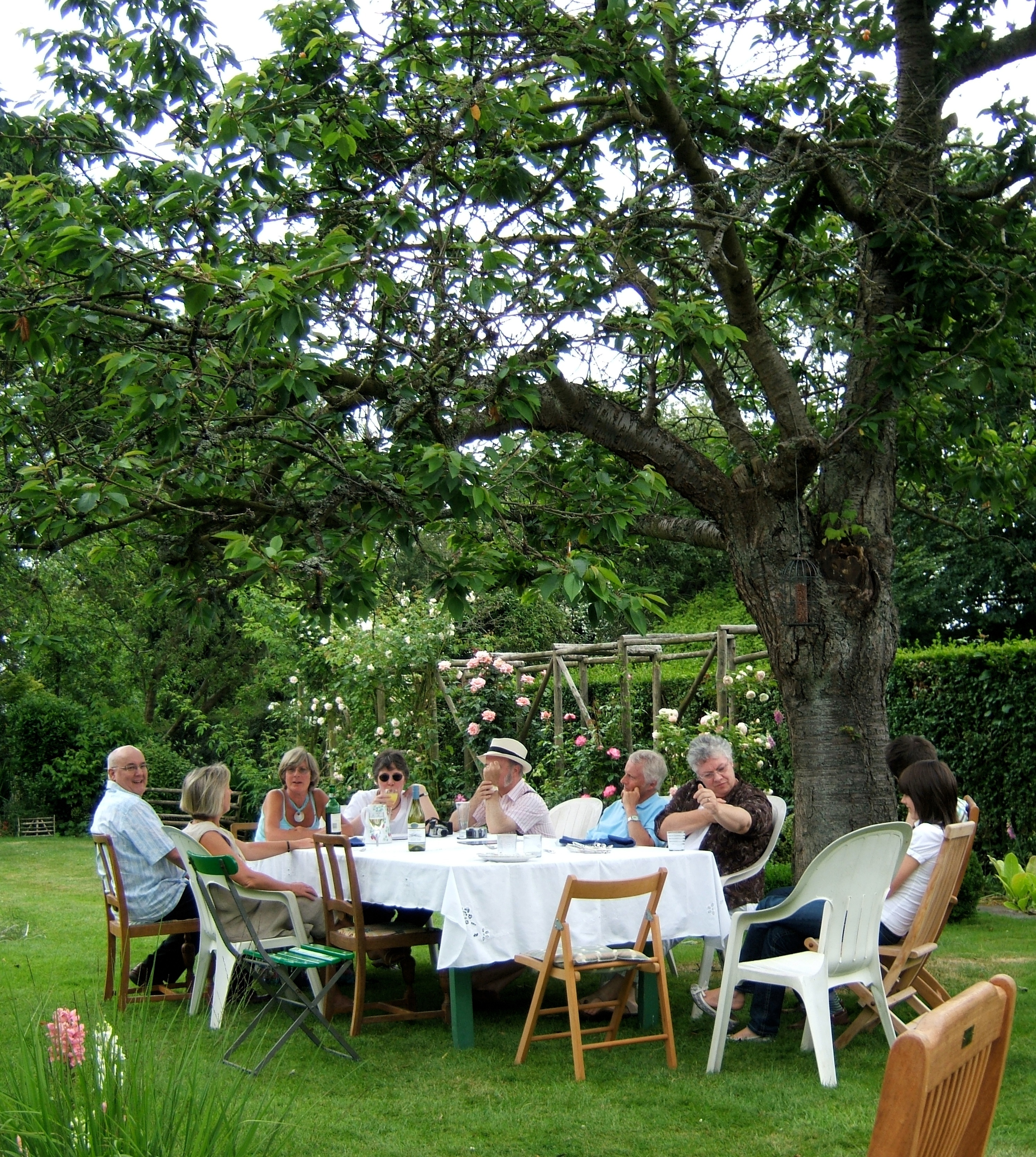 Dining outside